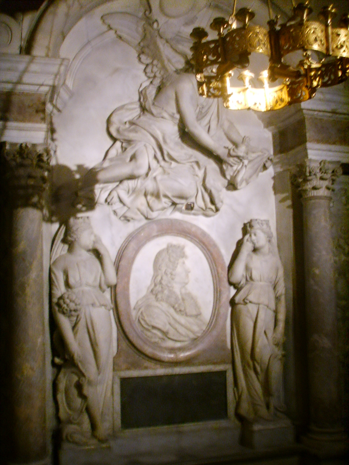 Basilica_di_saint_Denis luigi_XIV Paris